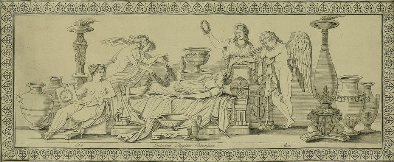 Königin Luise auf dem Sterbebett